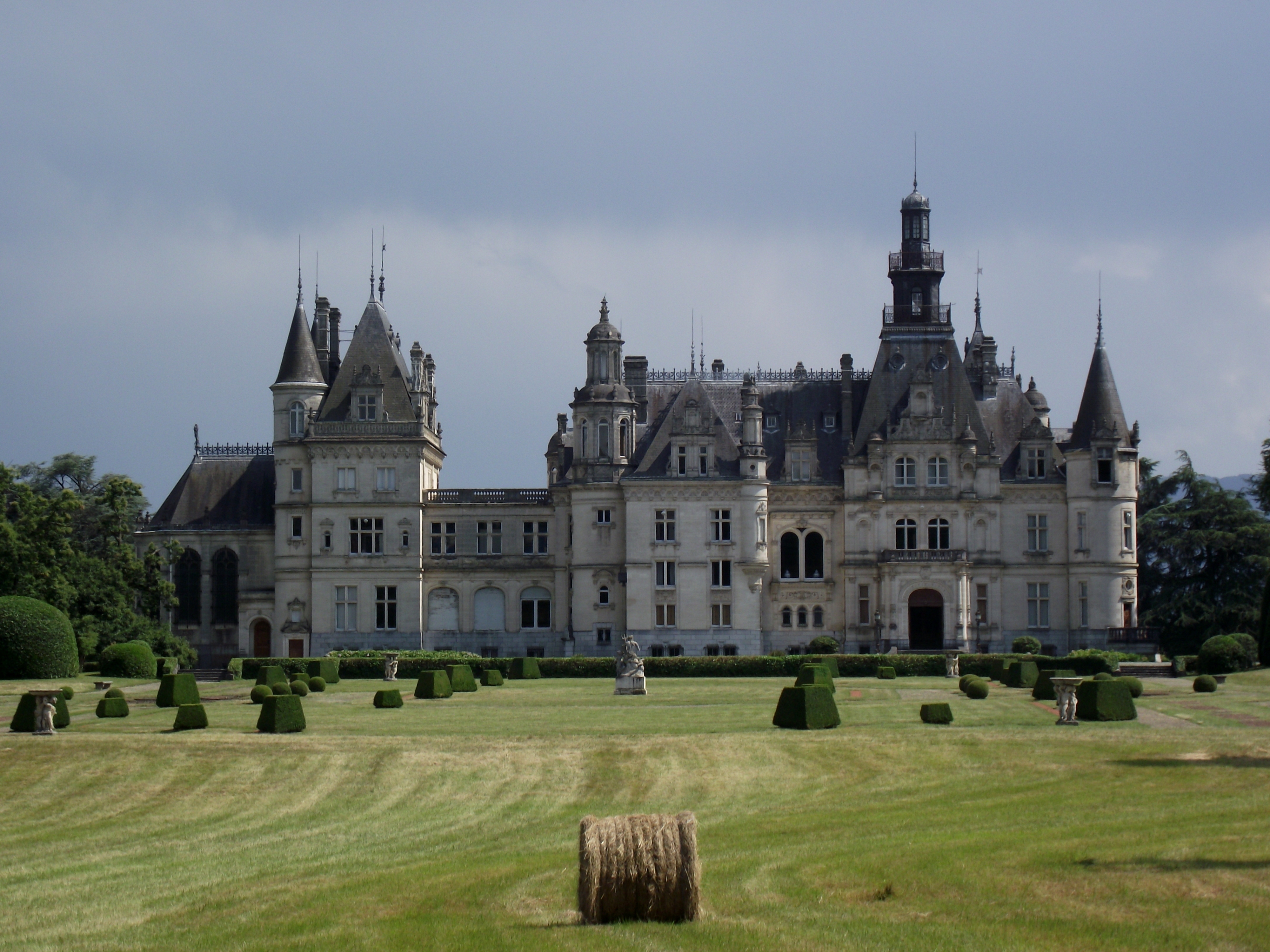 Château de Valmirande (France)